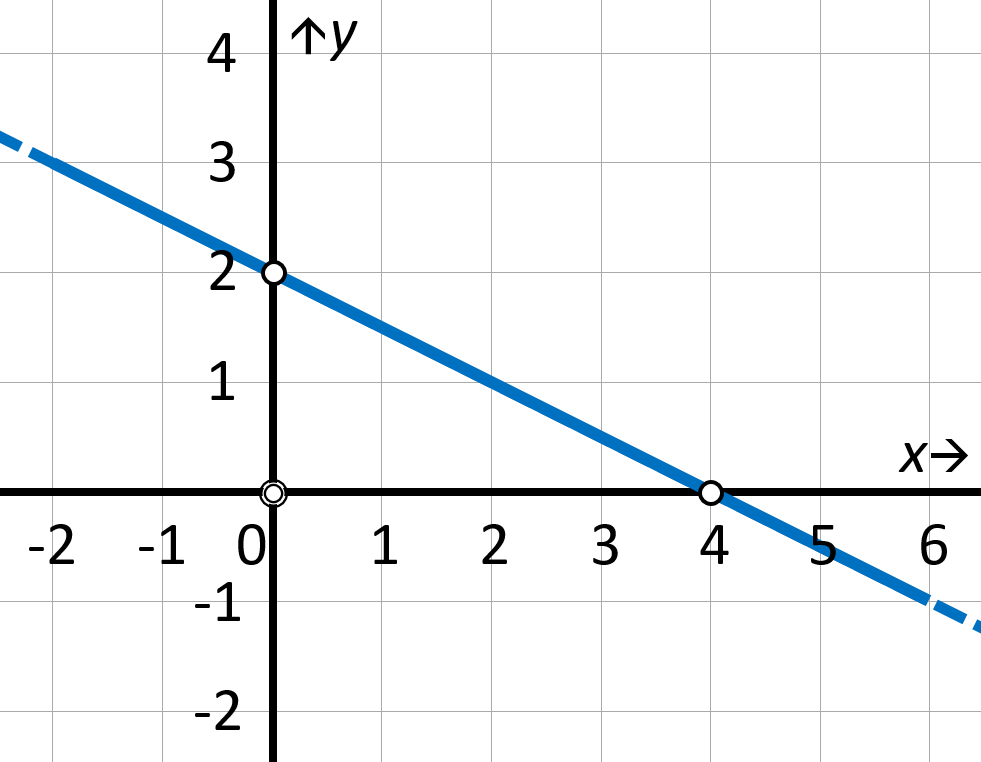 Representación de una recta con sus puntos de corte sobre los ejes cartesianos